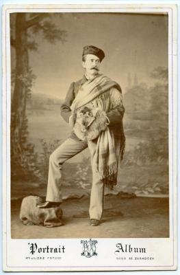 Juan Federico Muntadas Jornet, escritor, poeta y artífice del Parque Natural del Monasterio de Piedra